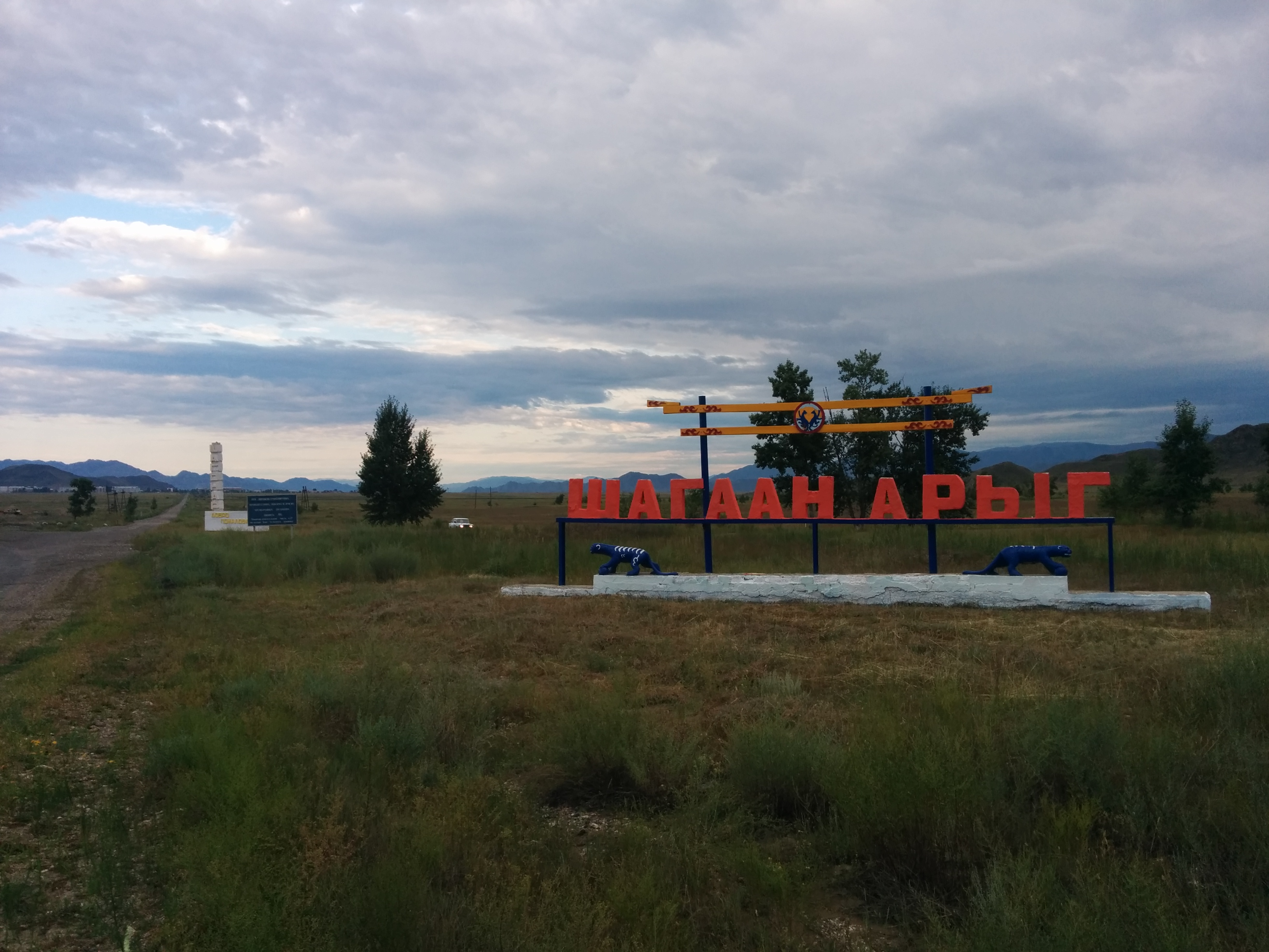 Тыва дыл: Шагаан-Арыг хоорайже Кызыл хоорайдан кирер көрүжү